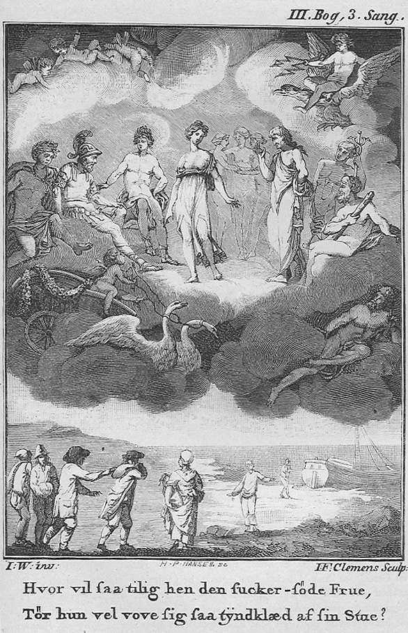 Stik af Clemens efter tegning af Wiedewelt til 1772 udgaven af Peder Paars